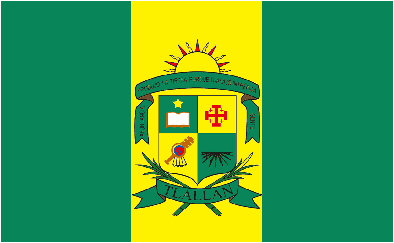 BanderaTala